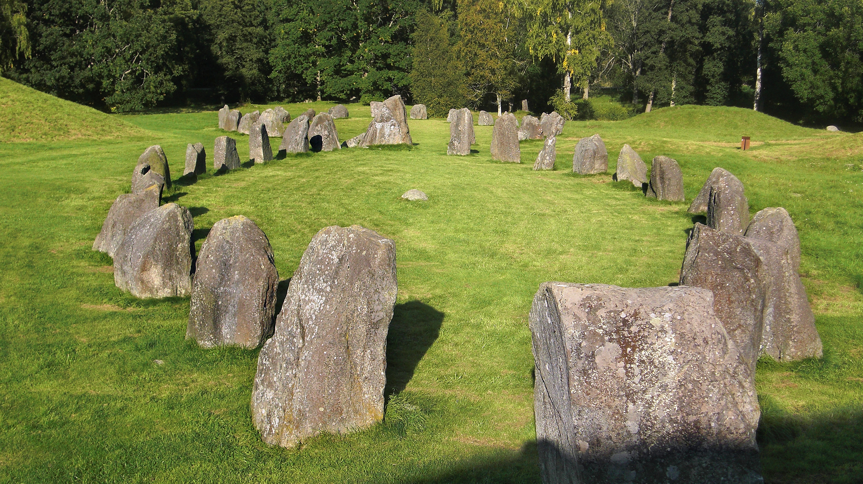 Skeppssättning vid Anundshög (Raä-nr Västerås 431:1) i Västerås kommun, Västmanland, Sverige.